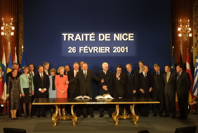 Ніццький договір